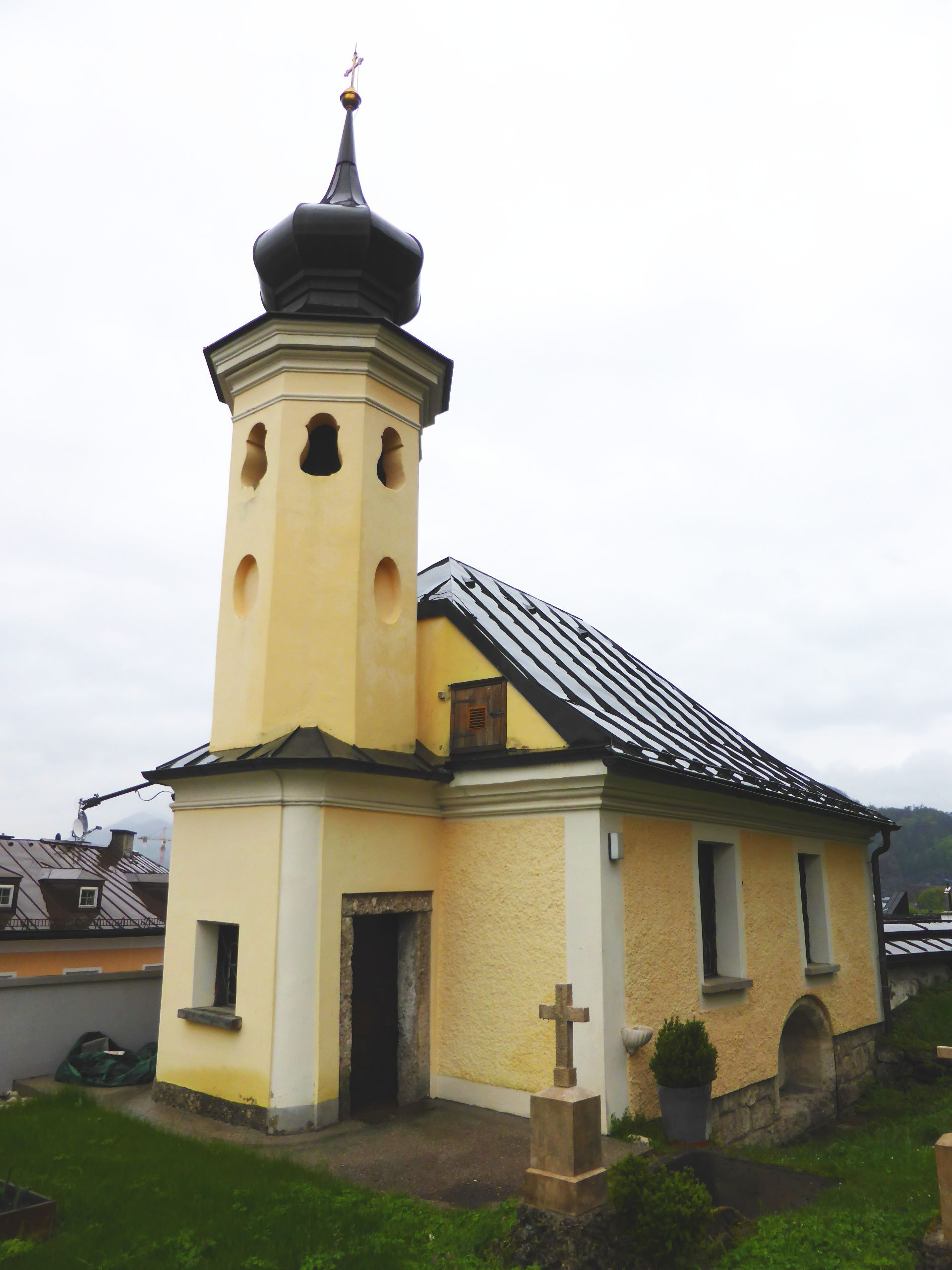 Totenkapelle mit Friedhof